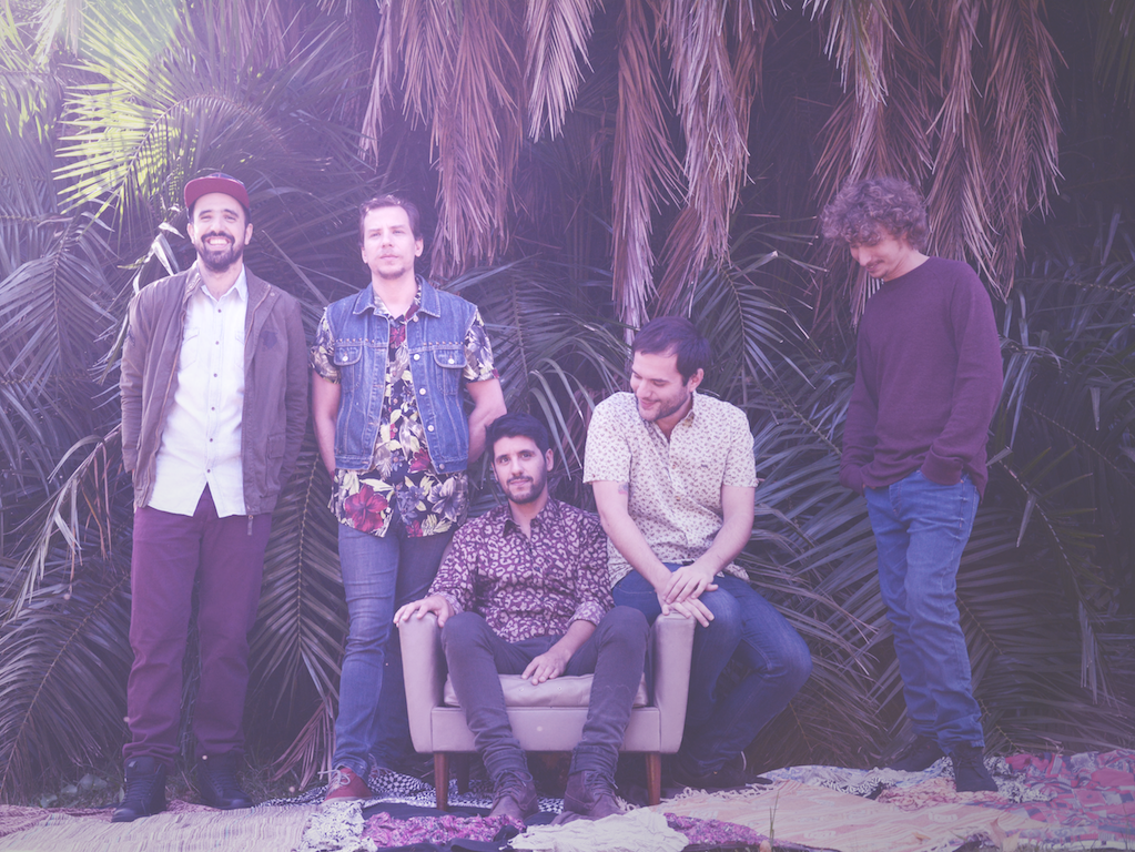 Santé Les Amis banda uruguaya en 2014